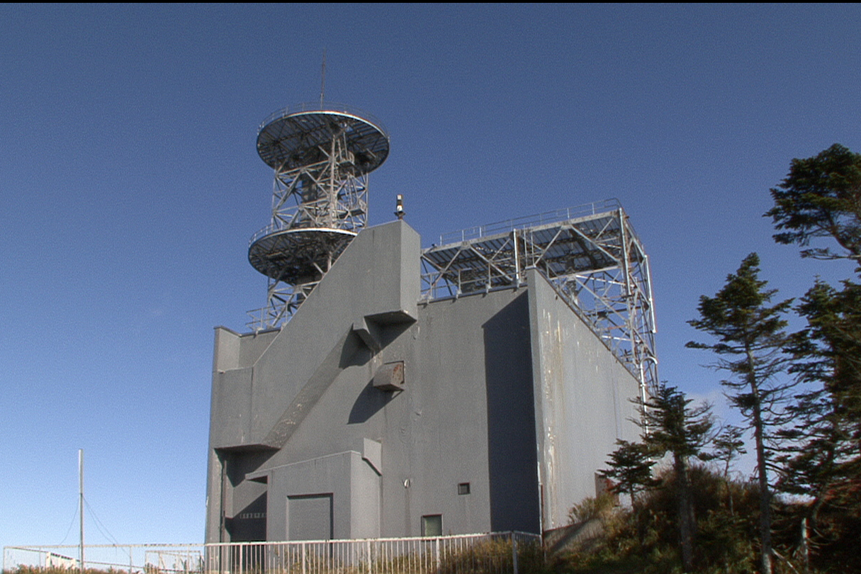 横手山ja:NTT無線中継所。空中線は取り外されていて、建屋と鉄塔が残る。